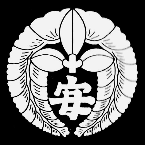 下り藤に安の字、安藤氏